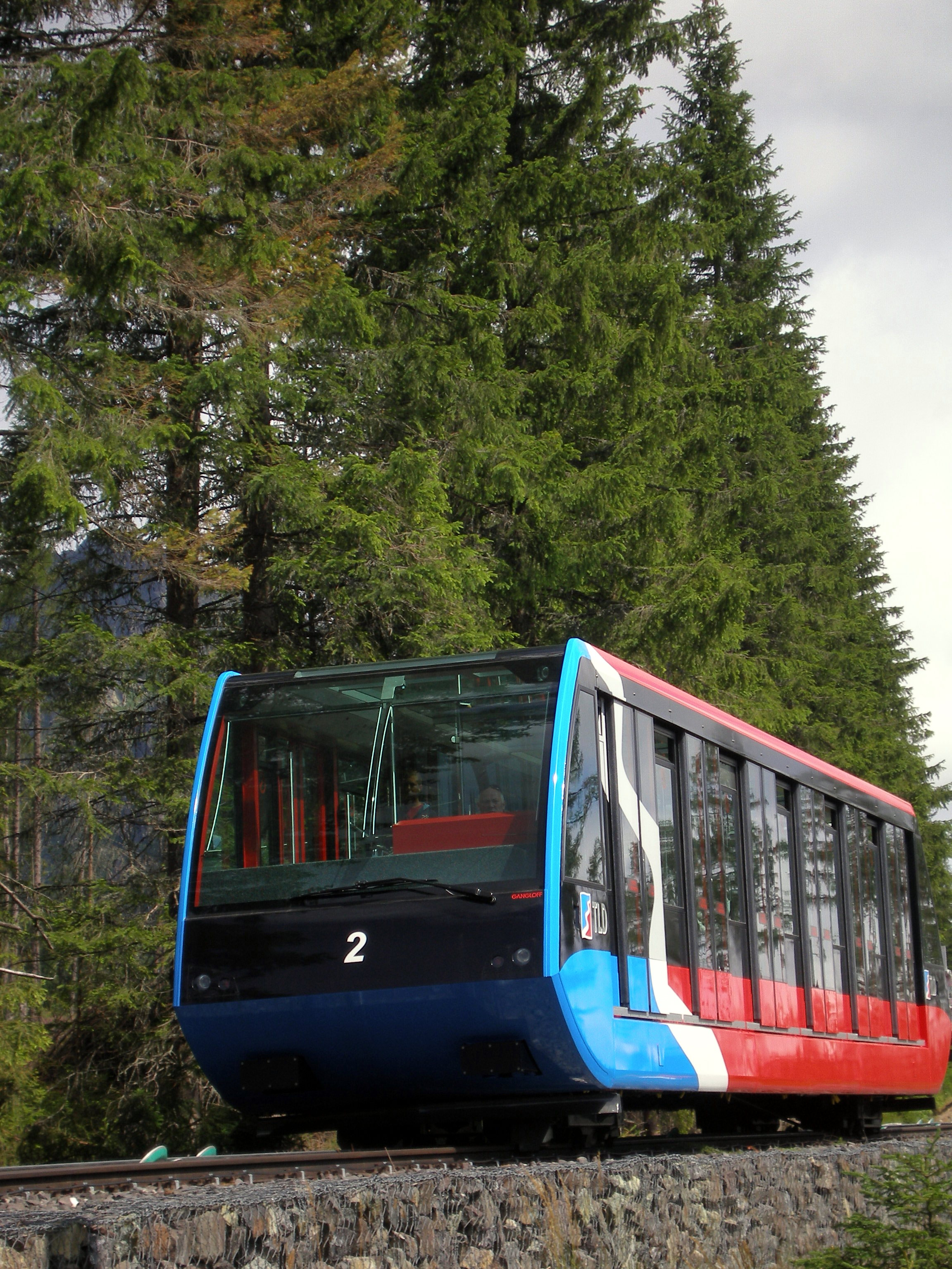 Mesto Vysoké Tatry. Cestou zo Starého Smokovca na Hrebienok.